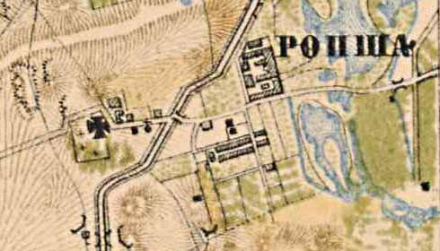 Ропша на карте 1885 года.